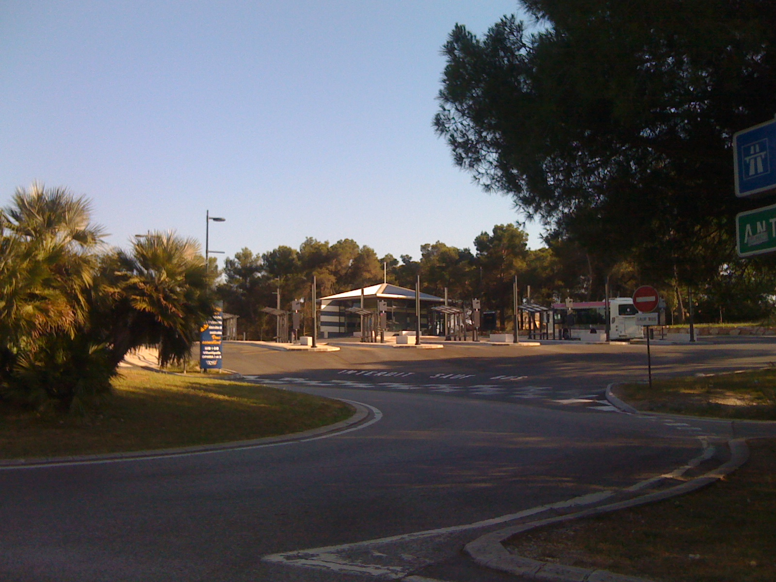 infrastructure créée par la Communauté d'Agglomération de Sophia Antipolis